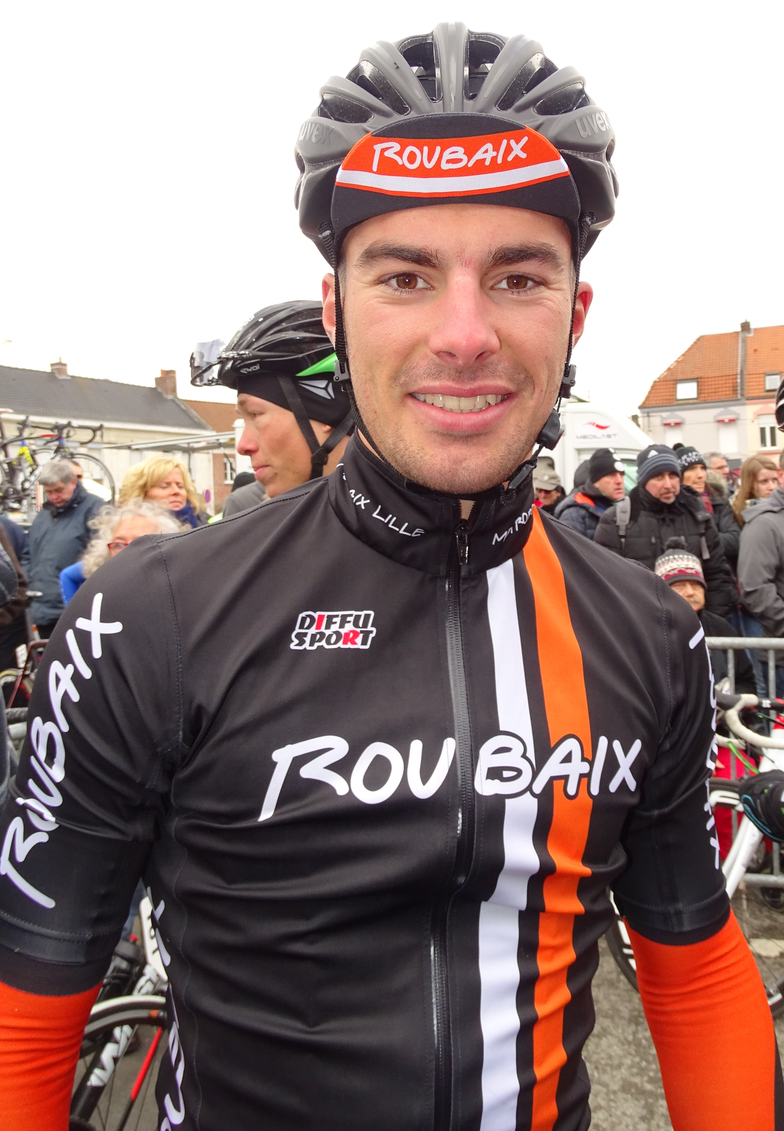 Reportage réalisé le dimanche 6 mars à l'occasion du départ et de l'arrivée du Grand Prix de Lillers-Souvenir Bruno Comini 2016 à Lillers, Pas-de-Calais, Nord-Pas-de-Calais, France.